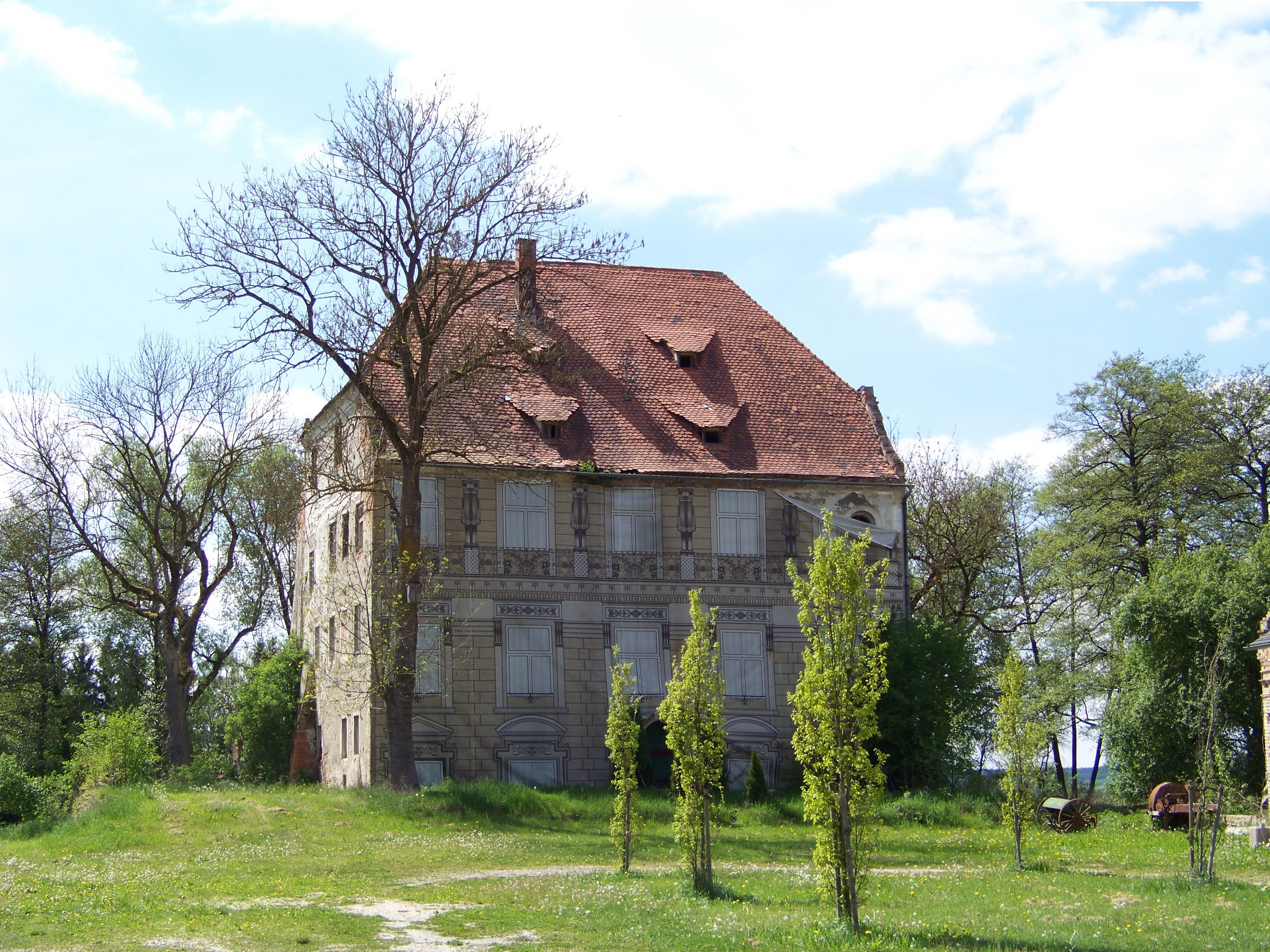 Schierling, Schlossstraße 3. Dreigeschossiger Halbwalmdachbau mit Kapelle, 17./18. Jahrhundert, im Kern mittelalterlich.